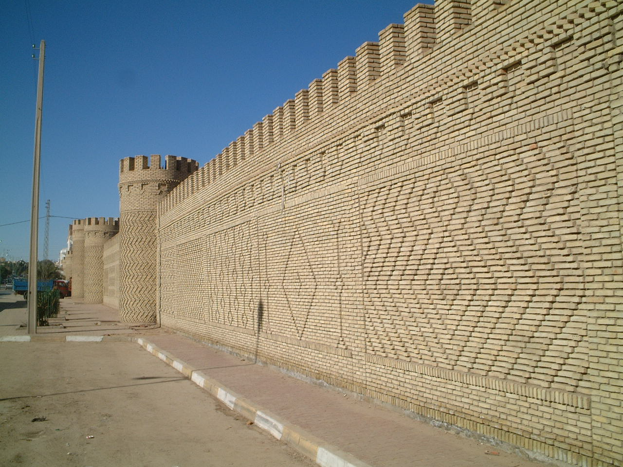 Tozeur, Tunisia.